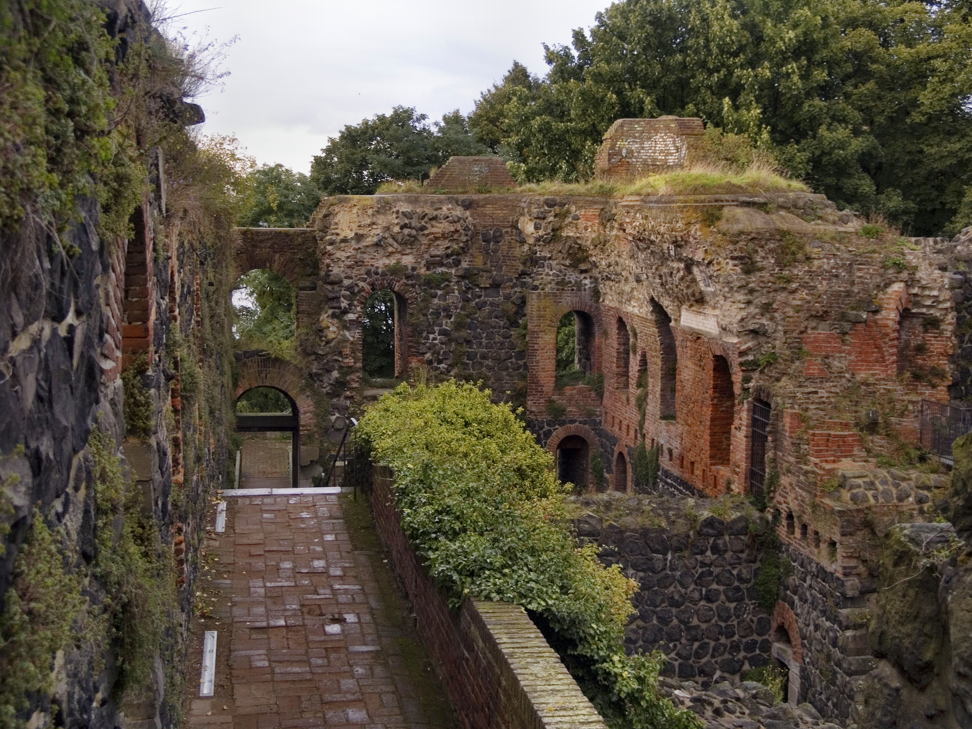 Северный Рейн - Вестфалия, Дюссельдорф - руины императорского дворца в Кайзерверте